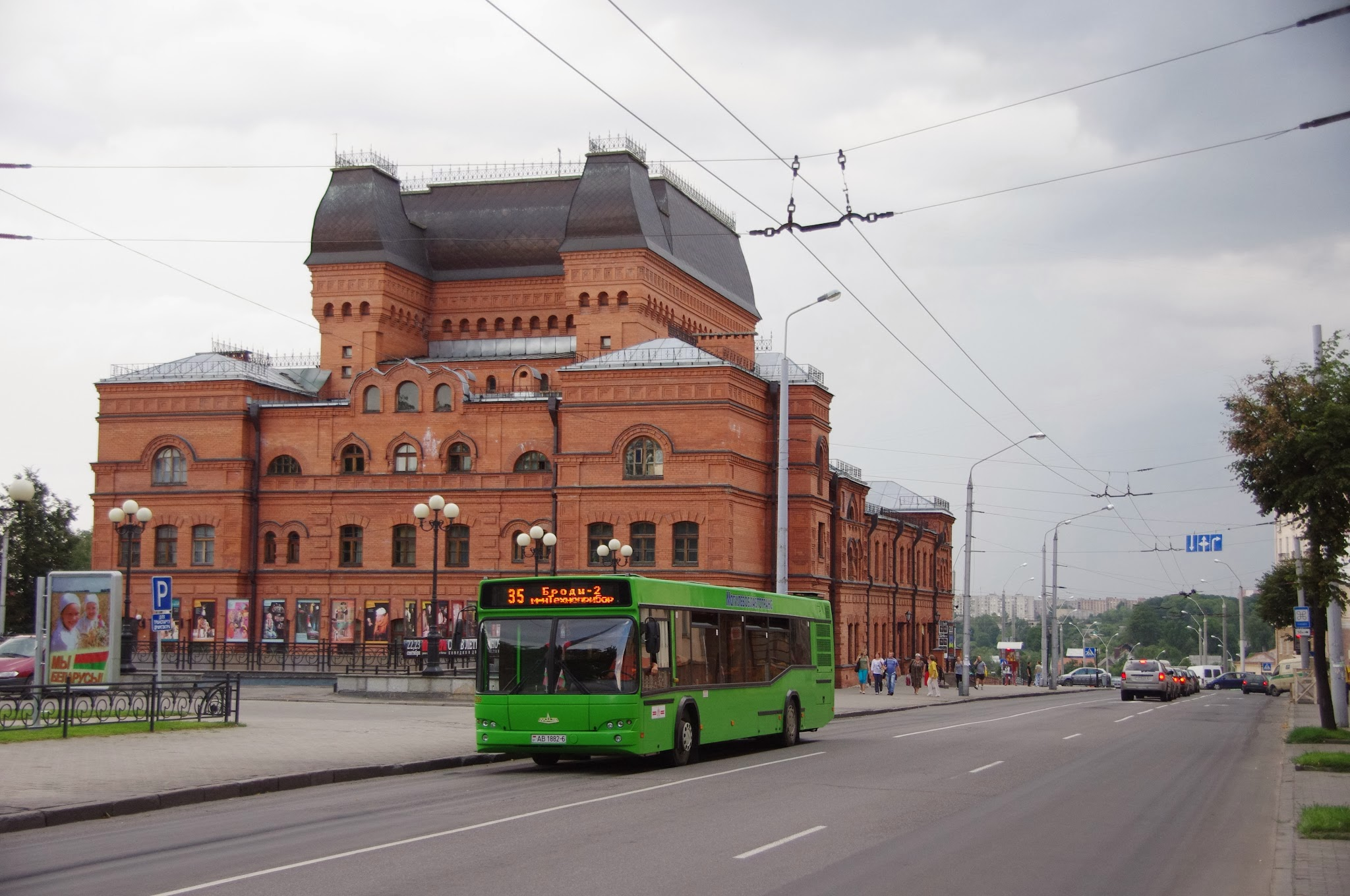 Lieninski District, Mogilev, Belarus